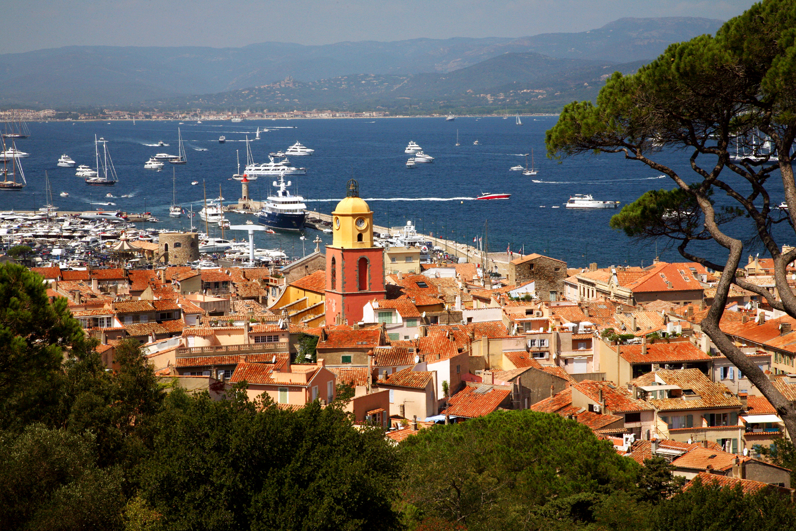 Франция. Лазурный Берег. Сан-Тропе